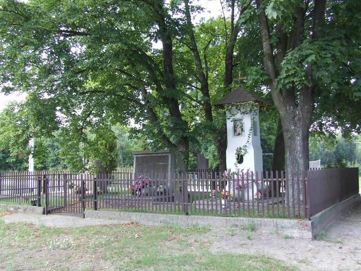 Sieraków, gmina Izabelin